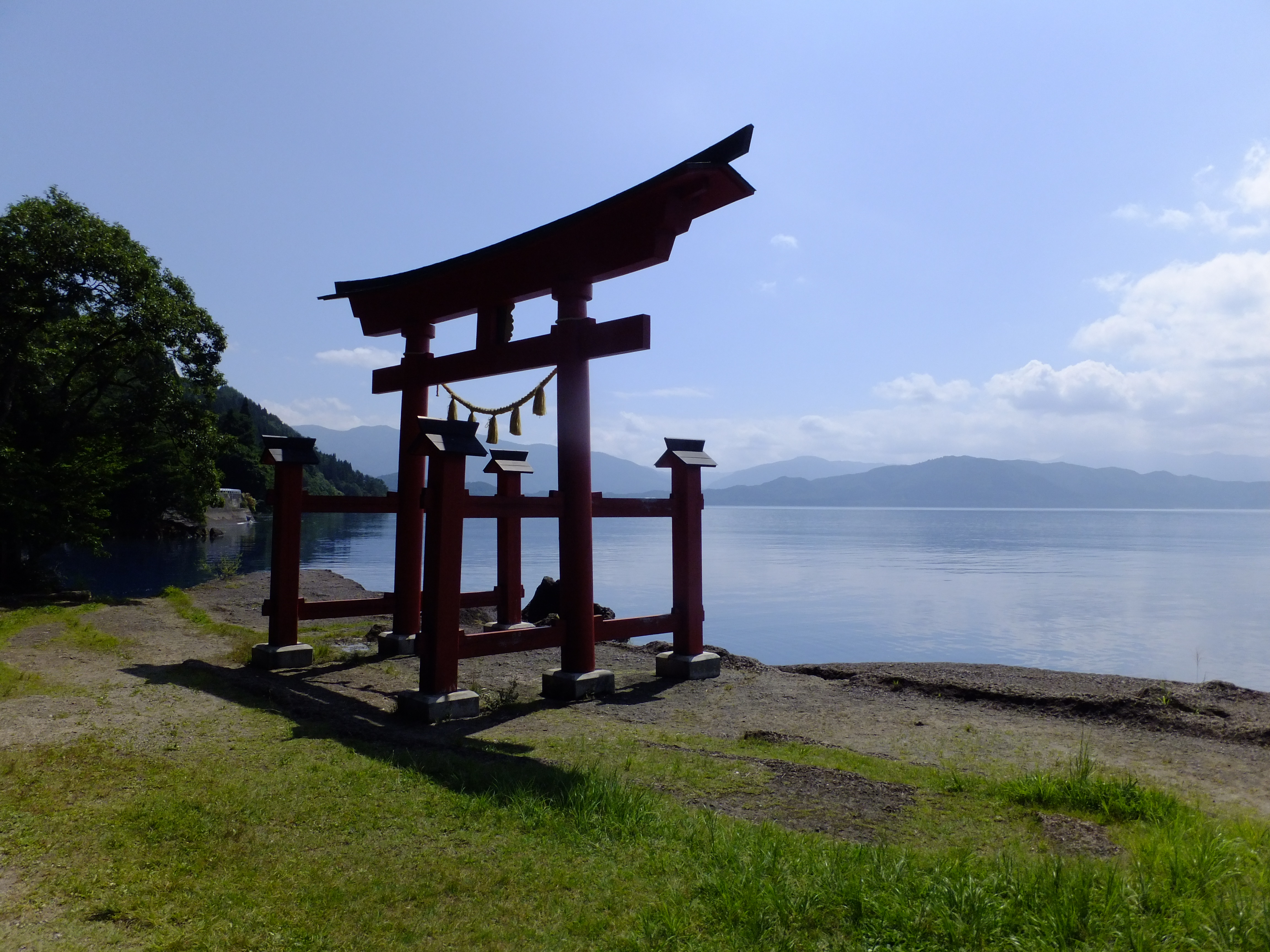 秋田県仙北市、田沢湖畔にある御座石神社。鳥居は田沢湖に面している。